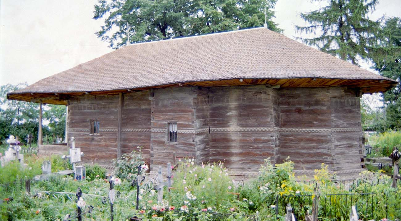 Miroslovești, Iași: biserica de lemn. Latura de sud.